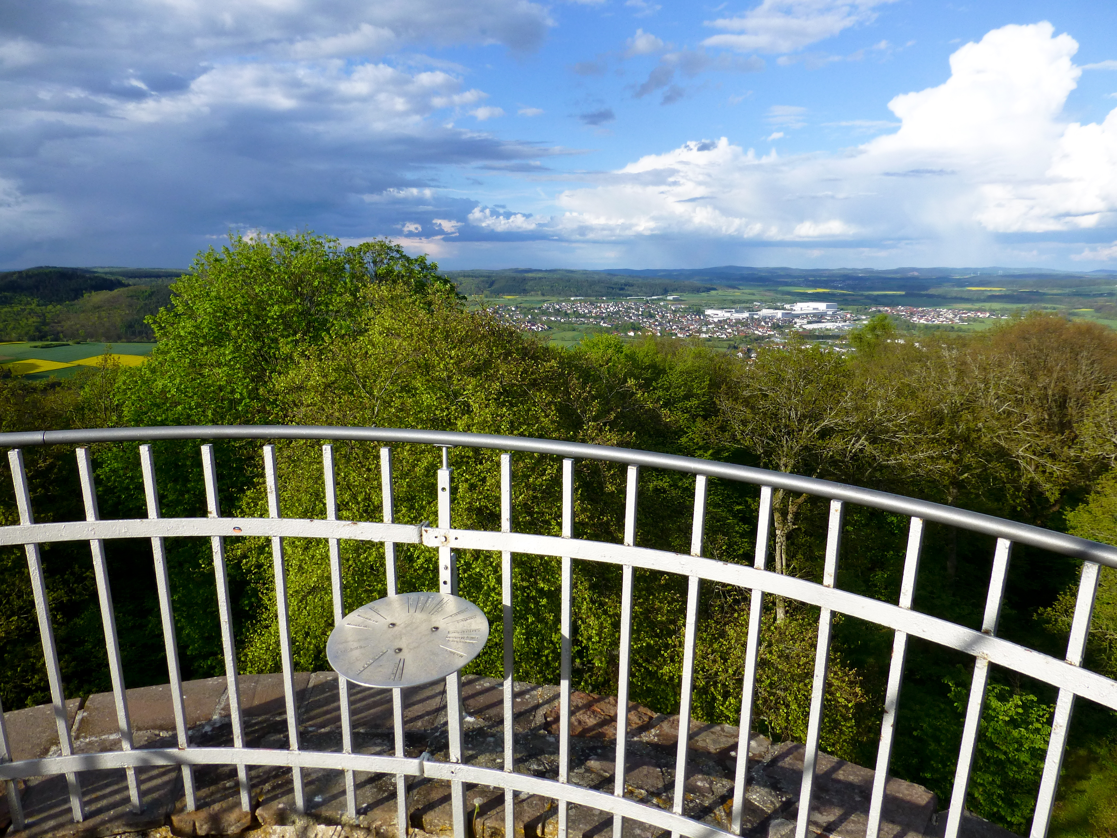 Blick vom Bergfried nach Nordosten in Richtung Allendorf (Eder)